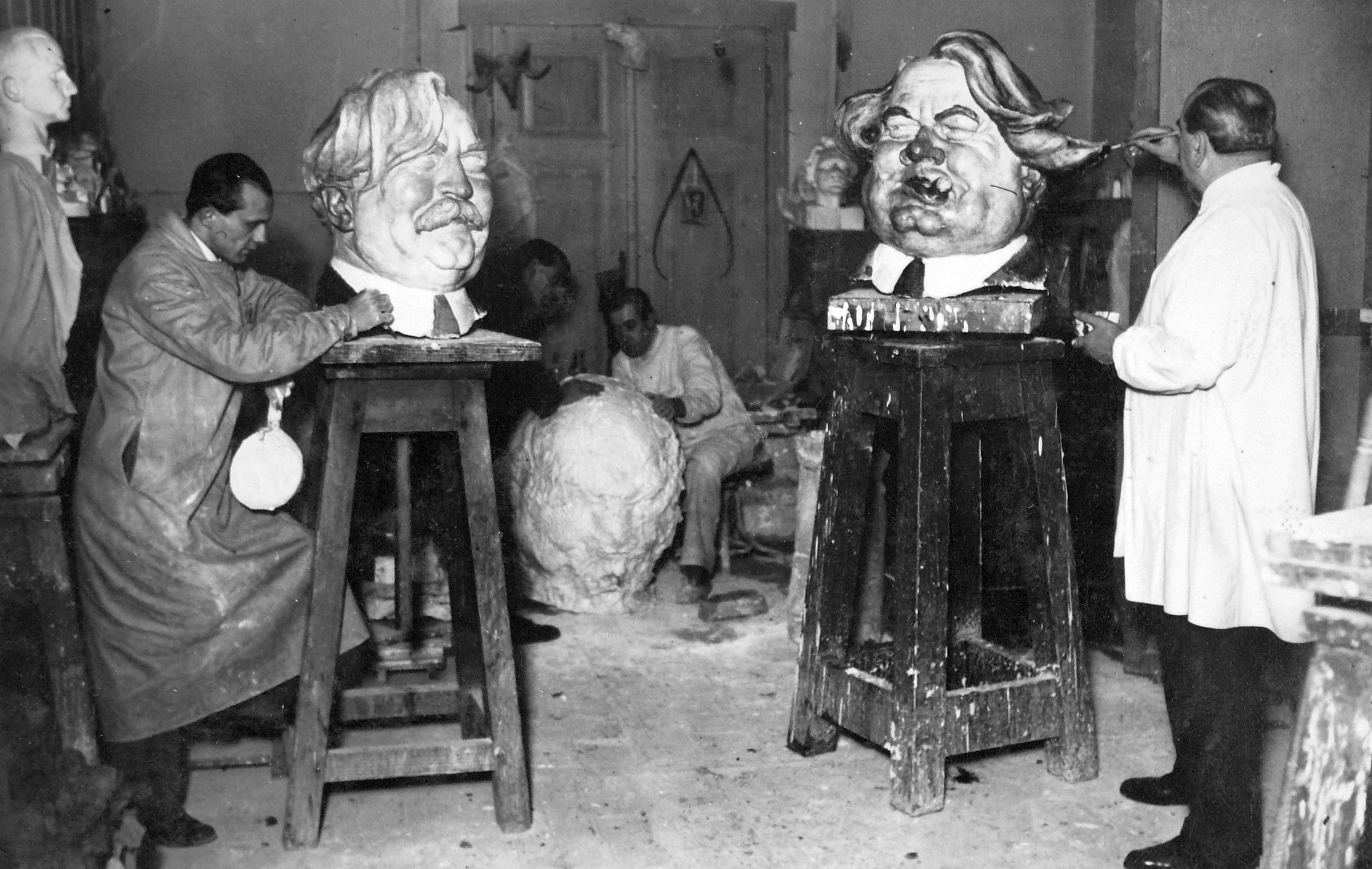 Lányi Dezső szobrászművész műtermében. Location: Hungary Tags: art of theater, celebrity, studio, sculpture, Zsigmond Móricz portrayal Title: Lányi Dezső szobrászművész műtermében.